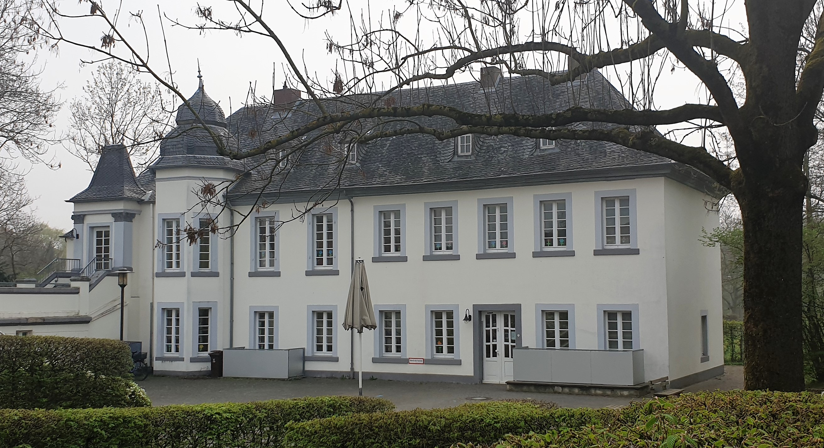 Straßenansicht des Jagdschlosses Entenfang im Wesselinger Stadtteil Berzdorf.